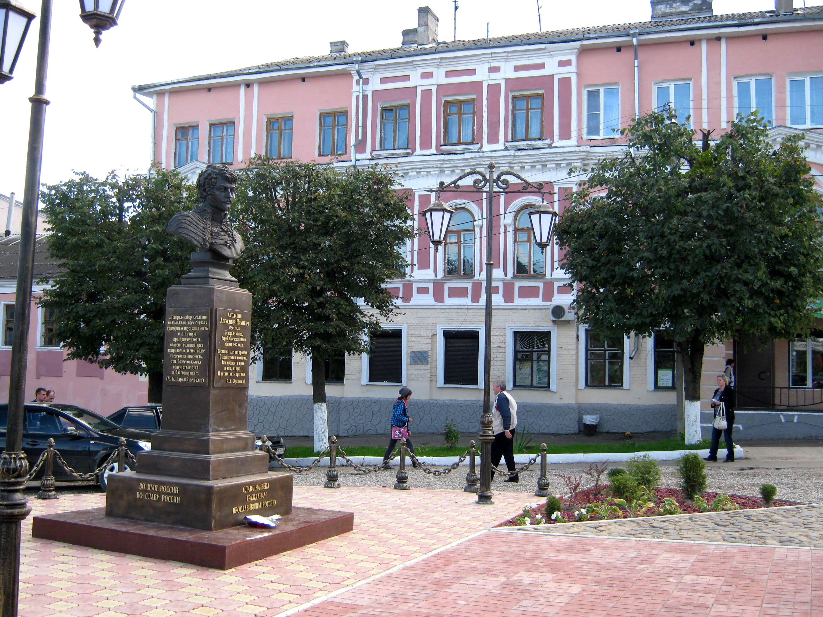 Памятник Сеславину (Ржев)